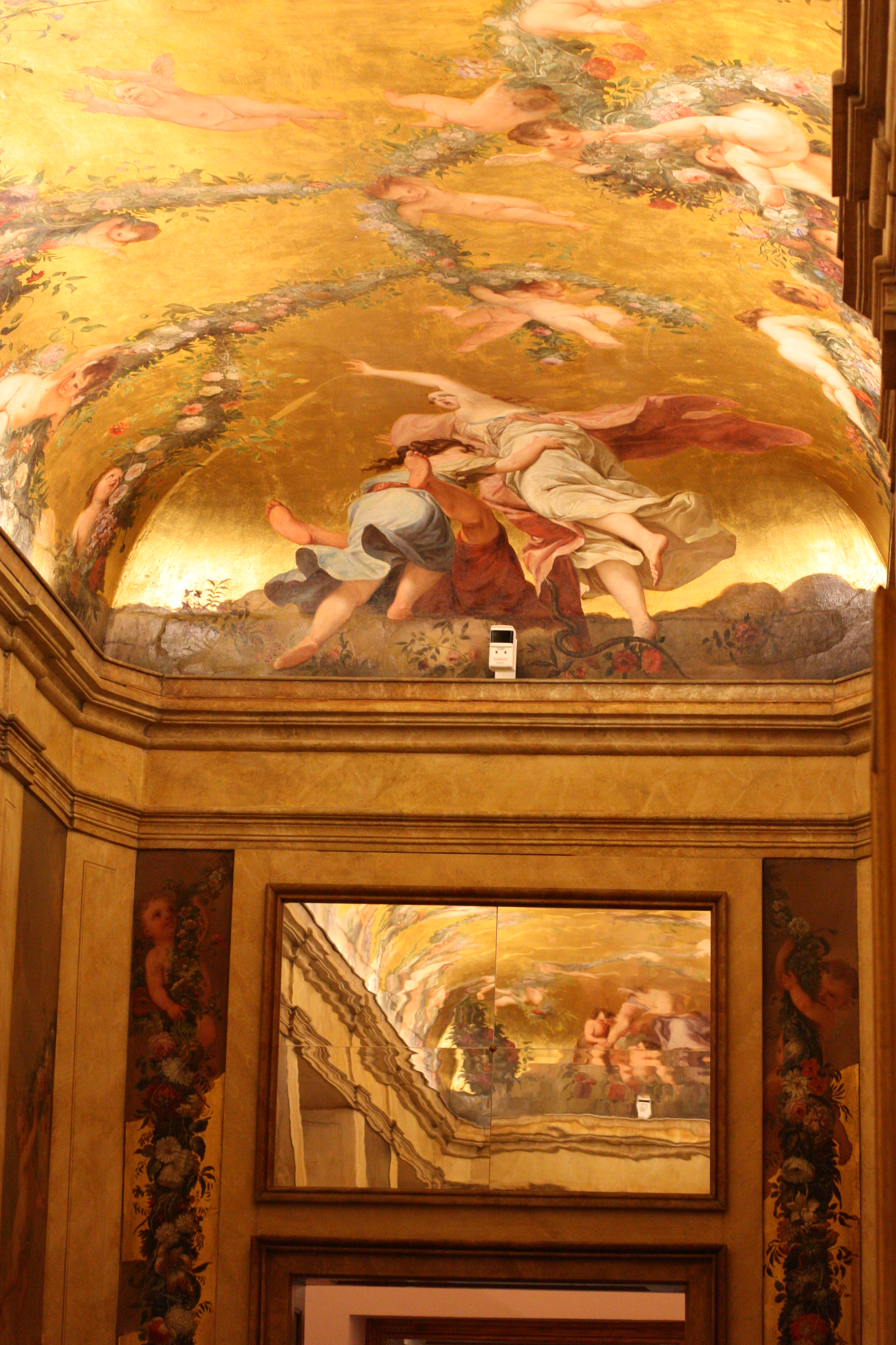 Globenmuseum, Wien, 2009